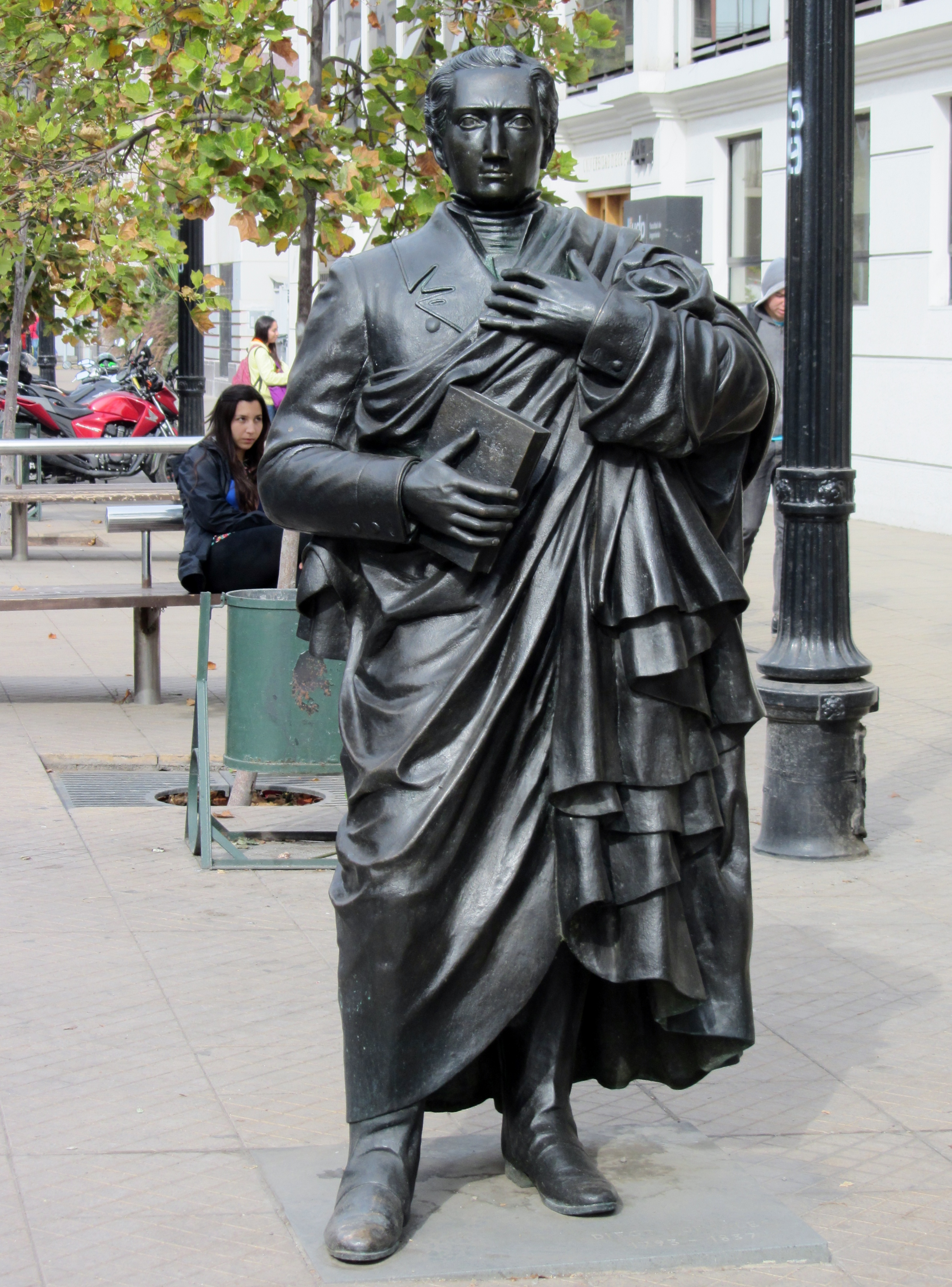 Escultura de Diego Portales por Juan Sebastián Solar. Se encuentra frente al palacio Piwonka, sede central de la Universidad Diego Portales y fue hecha por encargo de esta.